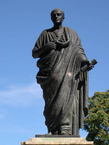 Séneca. Escultura en la Puerta de Almodóvar de Córdoba. Autor:Rafaelji. Cámara digital de 4'3 megapíxels. Tomada el 21-8-2004